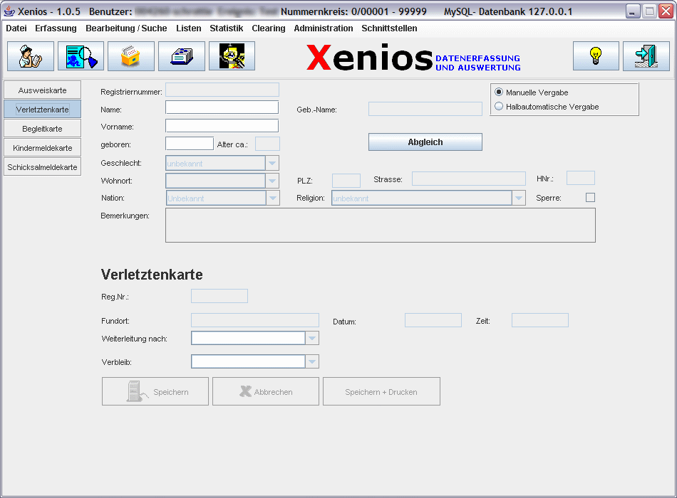 Screenshot von Xenios, einer Software für Auskunftsbüros des DRK.